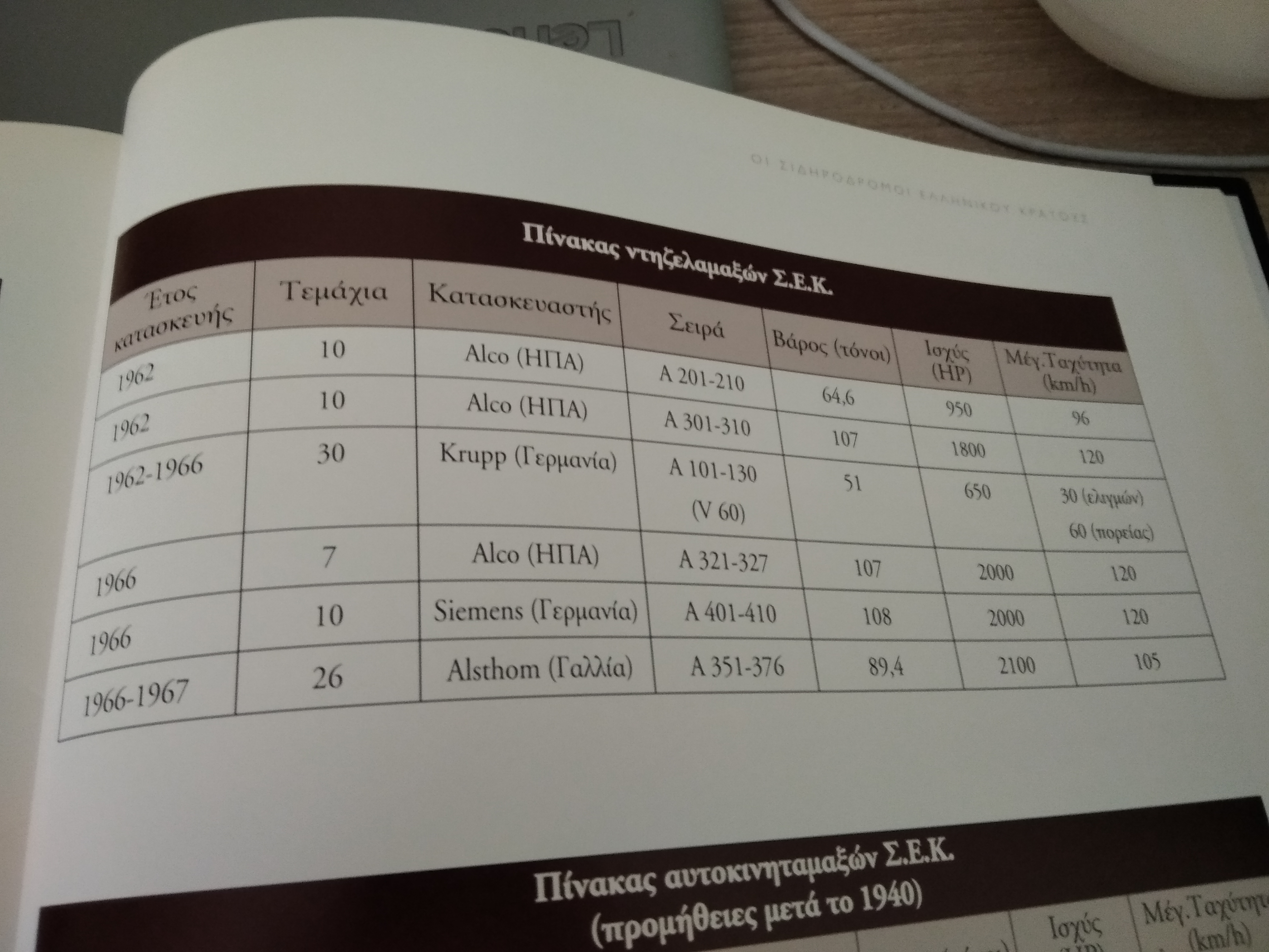 Μηχανές των Σ.Ε.Κ. (Σιδηρόδρομοι Ελληνικού Κράτους , η εταιρία πριν από τον ΟΣΕ (μέχρι το 1970)